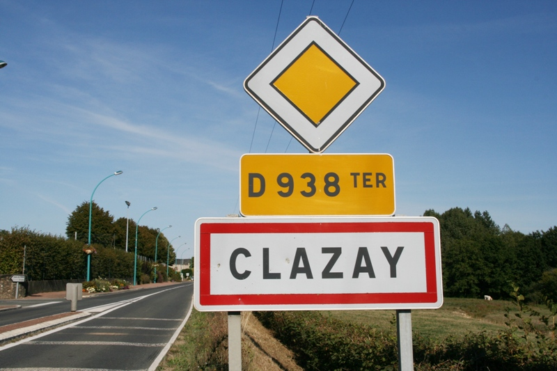 Français